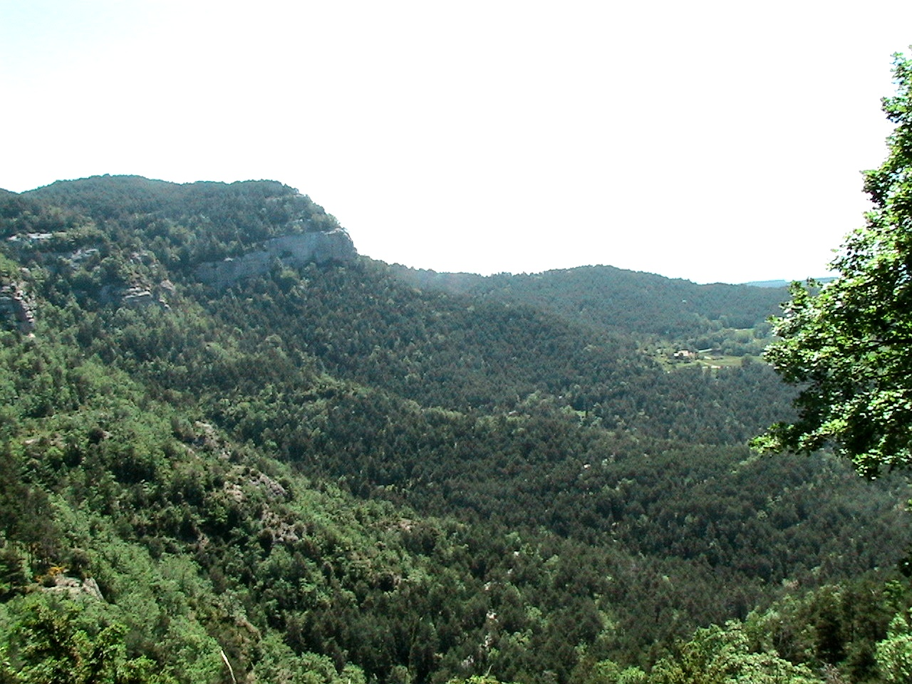 La solana de la Serra dels Tossals coberta de bosc mixt de pi i alzina. Capolat (Berguedà - Catalunya)